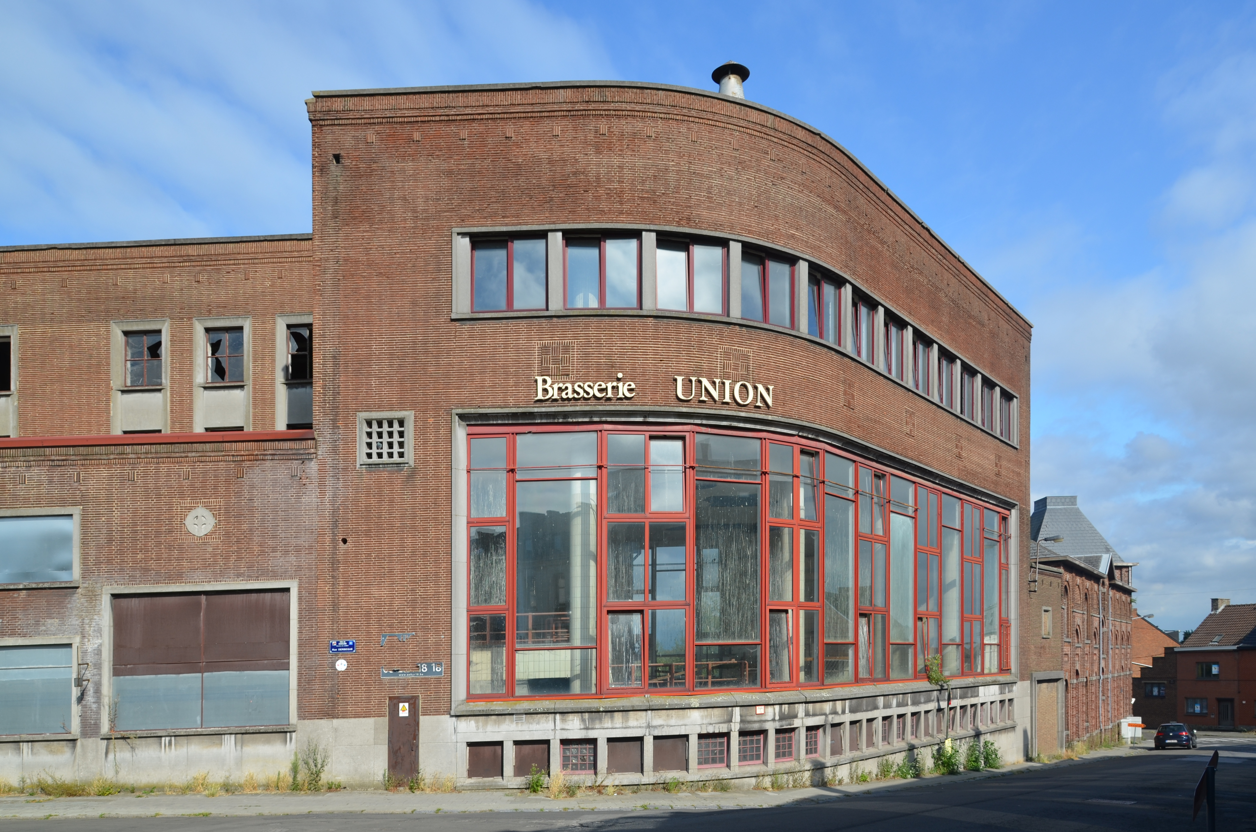 Jumet (Charleroi-Belgique) - Brasserie de l'Union.